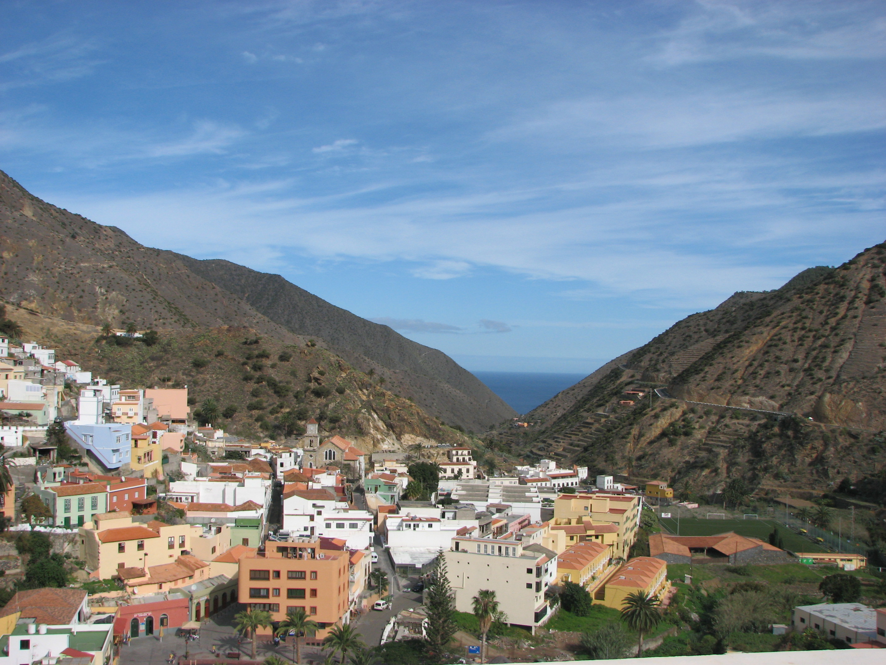 La Gomera, Canarische Eilanden, Spanje